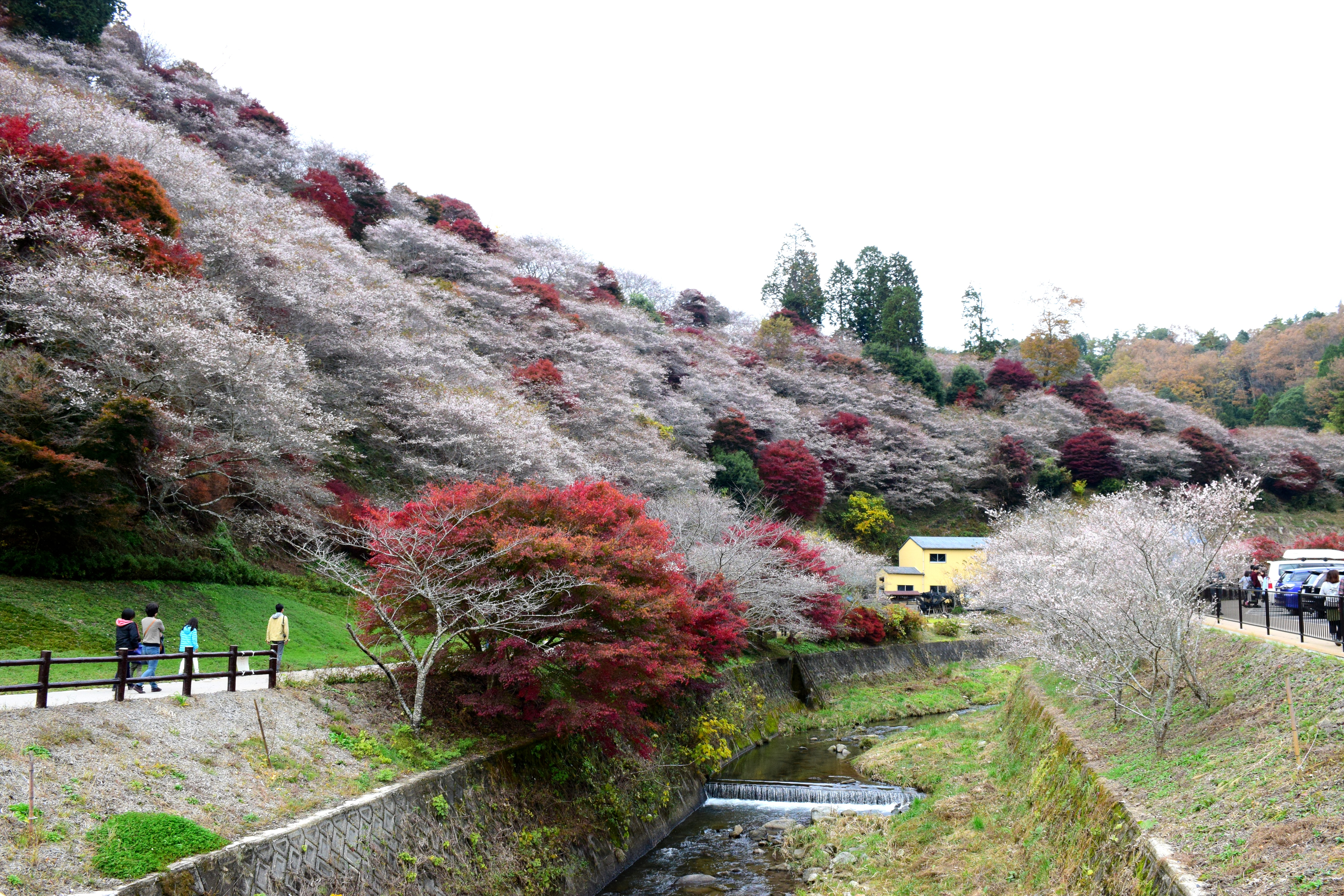 川見四季桜の里